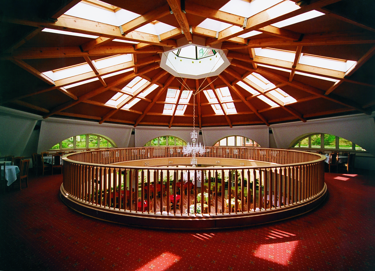 Оригинальное архитектурное решение возведения кровли с использованием мансардных окон